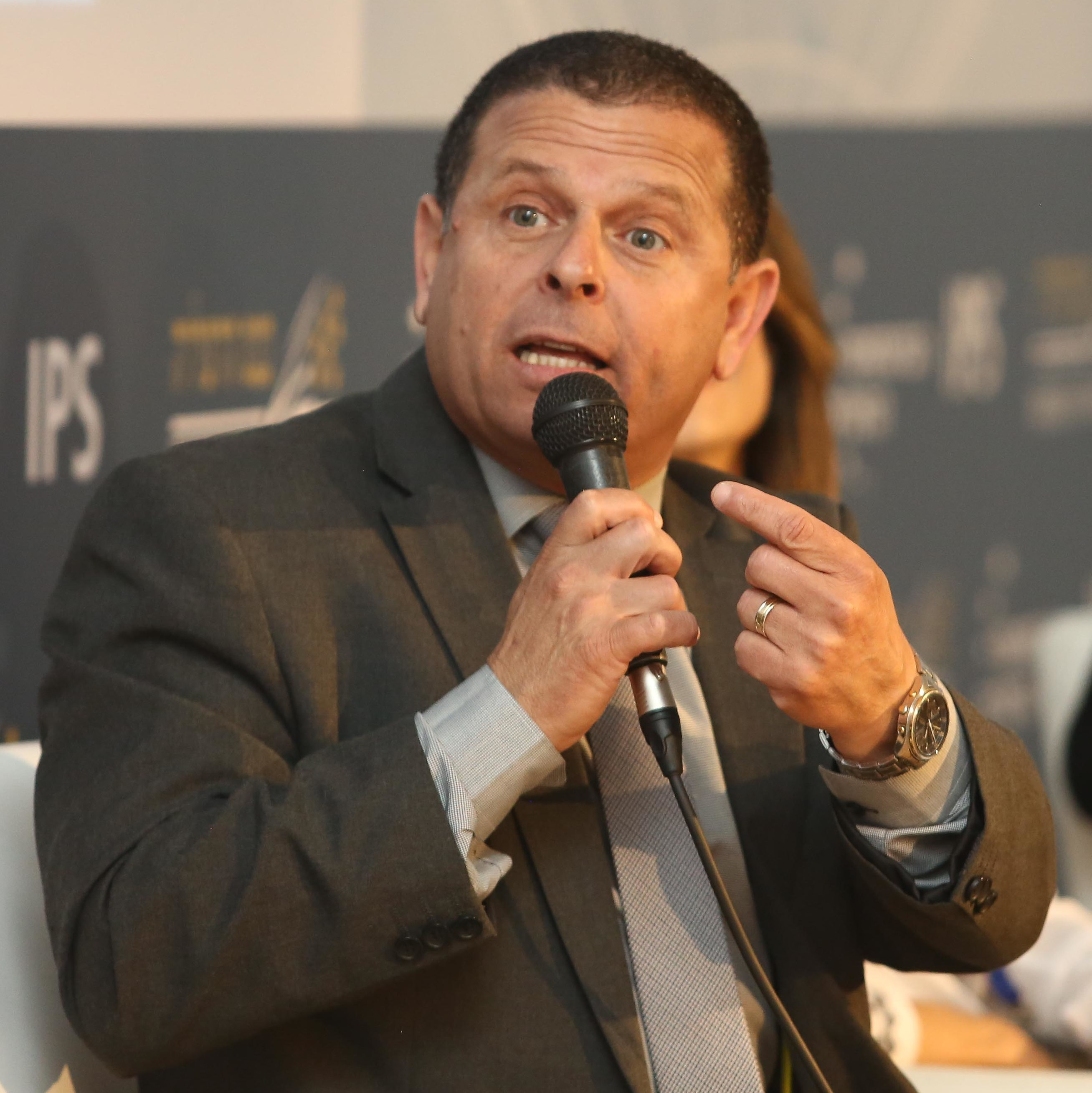 איתן כבל בכנס הרצליה 2016 של המכון למדיניות ואסטרטגיה במרכז הבינתחומי הרצליה